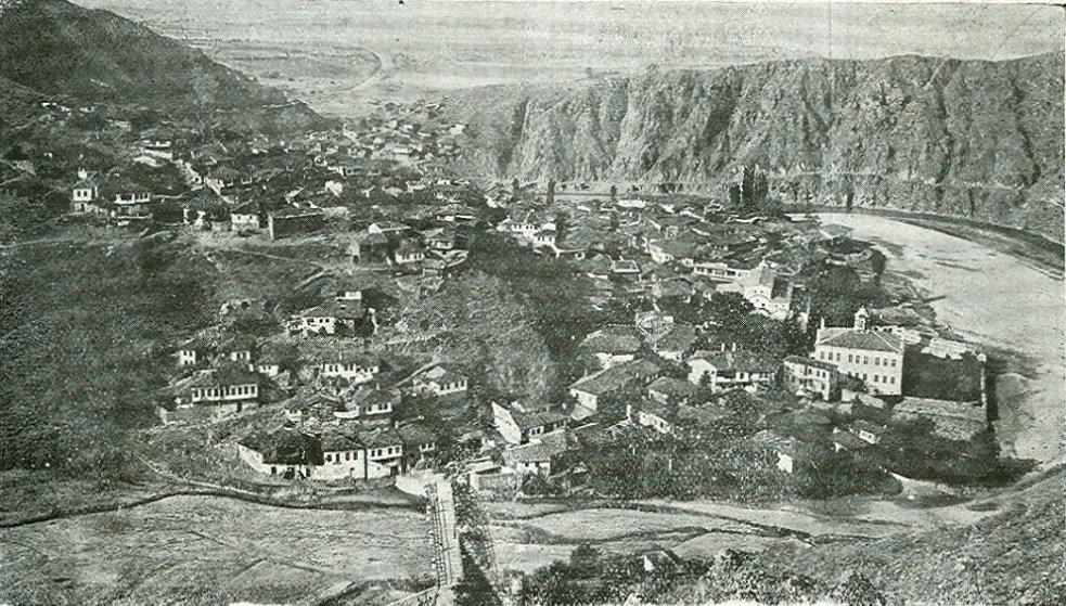 Изглед към Ново село от началото на 20 век.